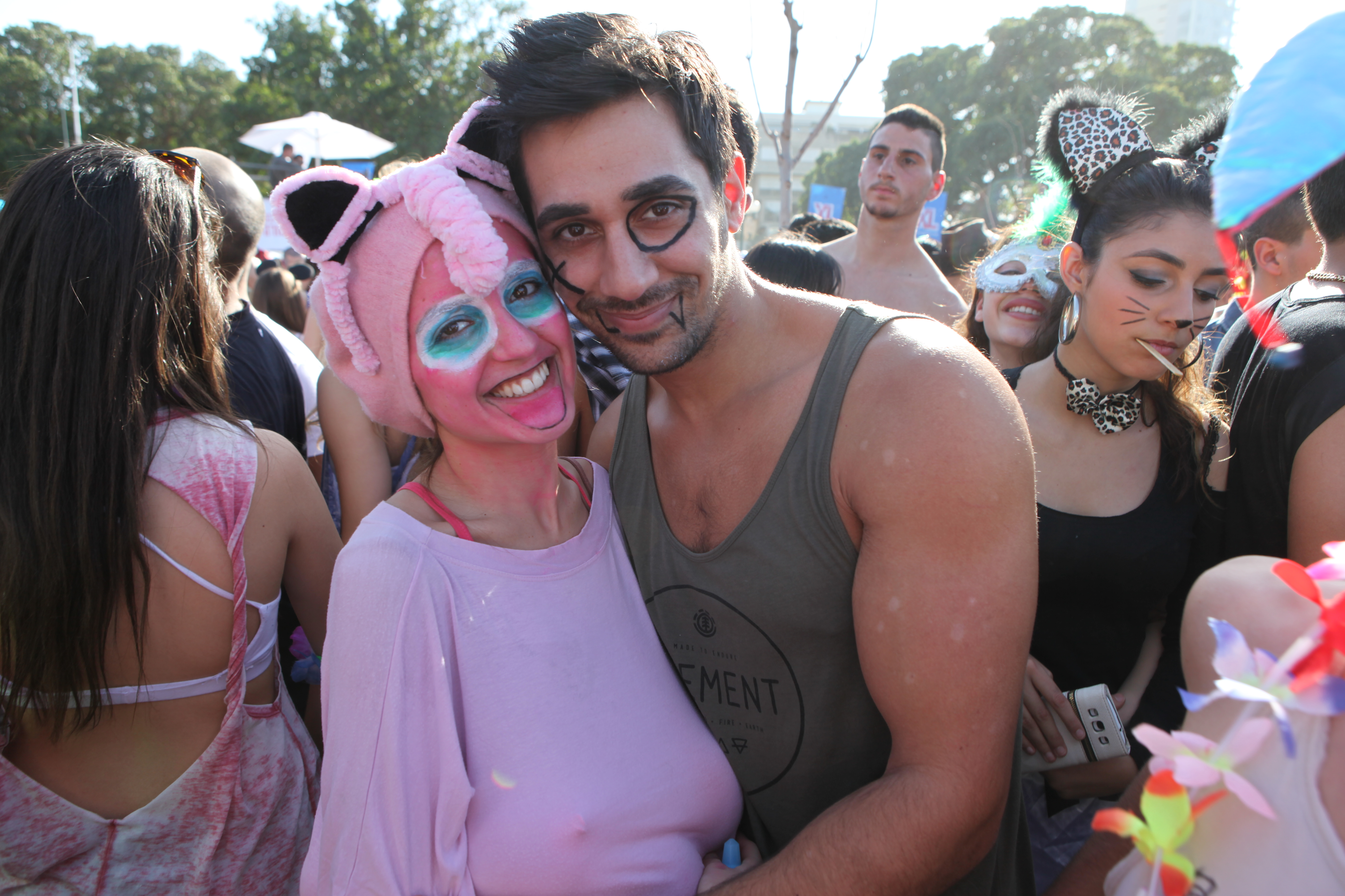 6.3.2015 2015 Purim in Israel